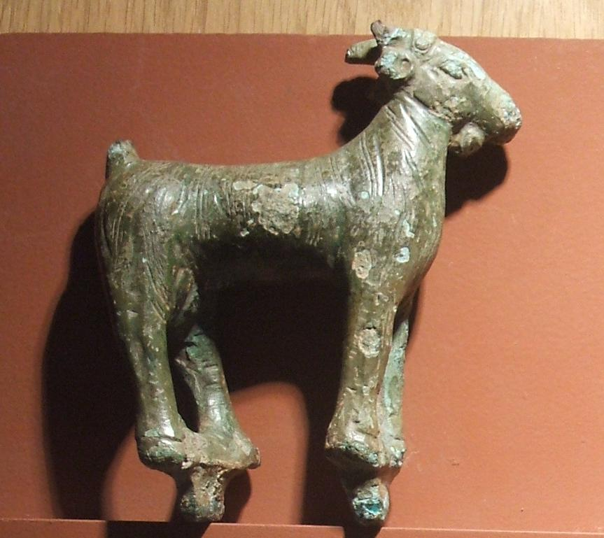 En Aliseda